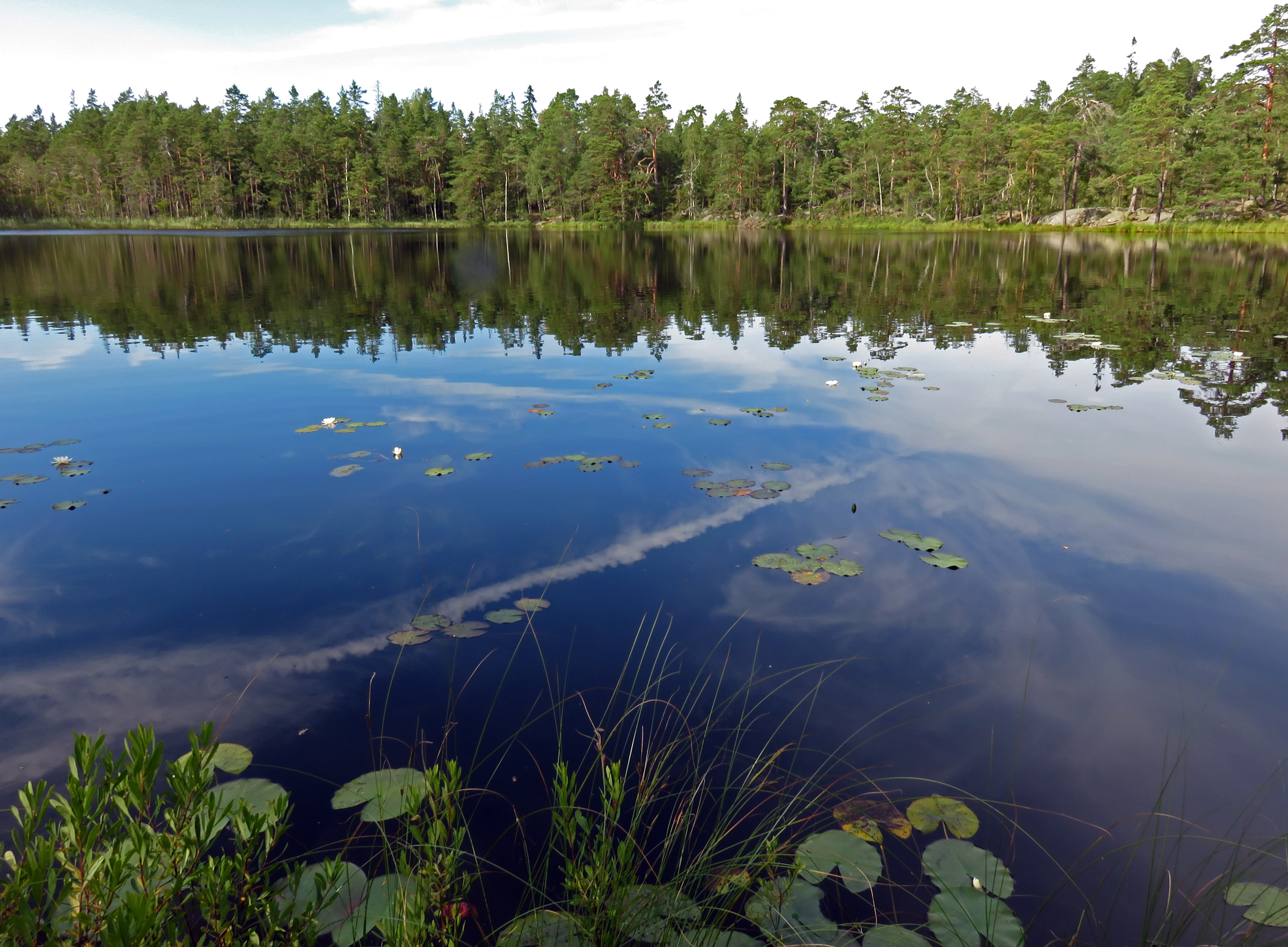 Gammeldammen, Södermanland